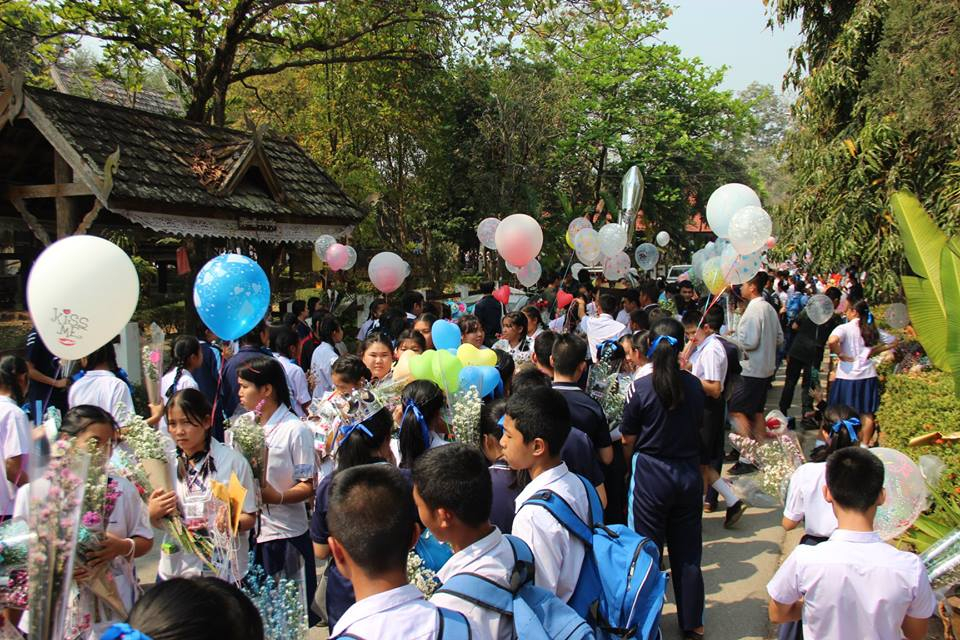 พิธีปัจฉิมนิเทศและจบหลักสูตร ปีการศึกษา 2560 ส.ว.